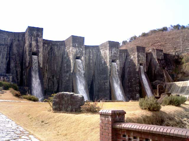 豊稔池ダム - 日本国香川県観音寺市